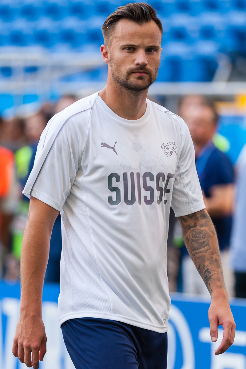 Бразилия и Швейцария готовятся к очной встрече на «Ростов Арене»